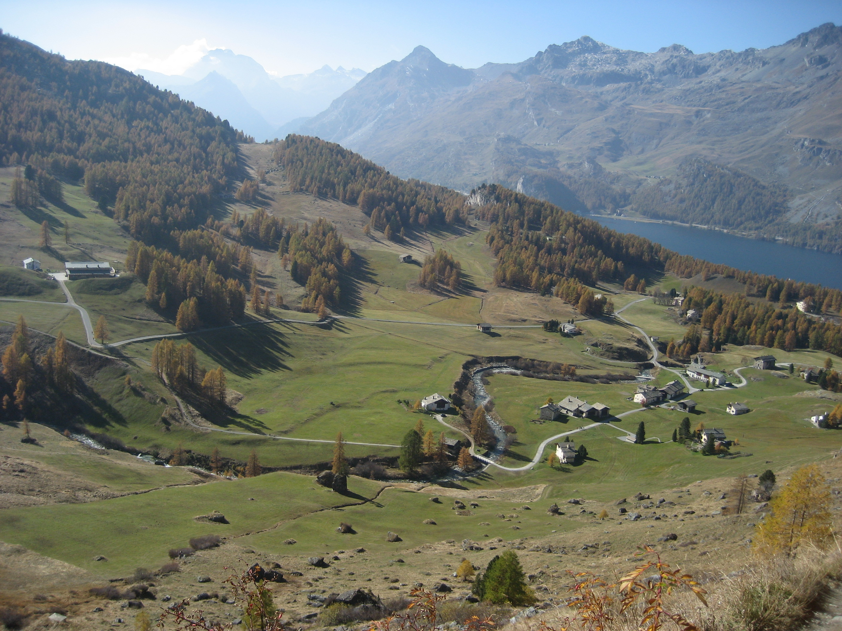 Vorderes Fextal mit der Siedlung Platta. Im Hintergrund der Silsersee